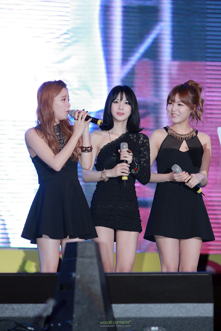 가비엔제이